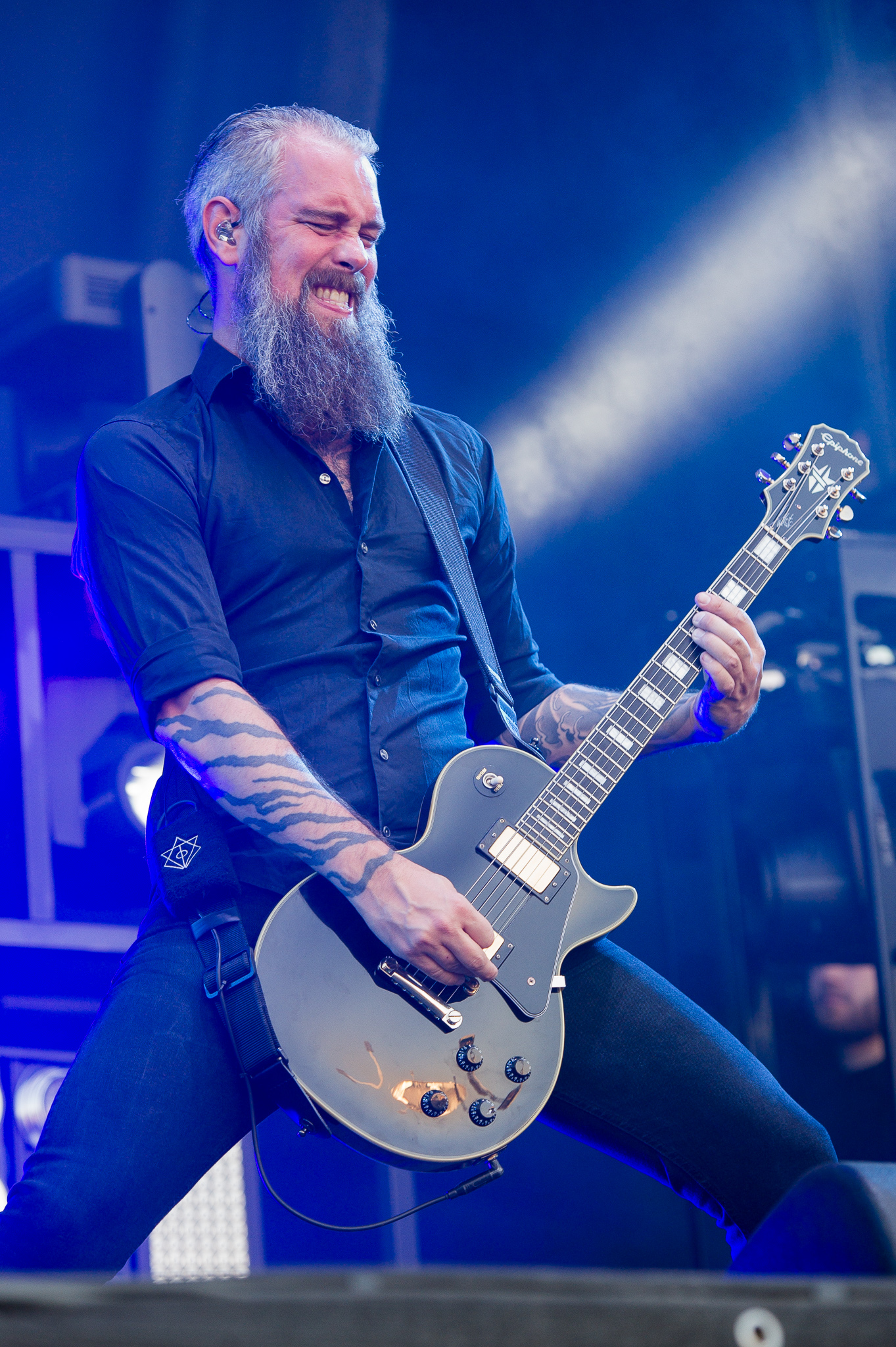 ARGO-Konzerte,Beck's Park Stage,Björn Gelotte,Festival,In Flames,Konzert,Livekonzert,Livemusik,Musik,RiP,Rock im Park 2015